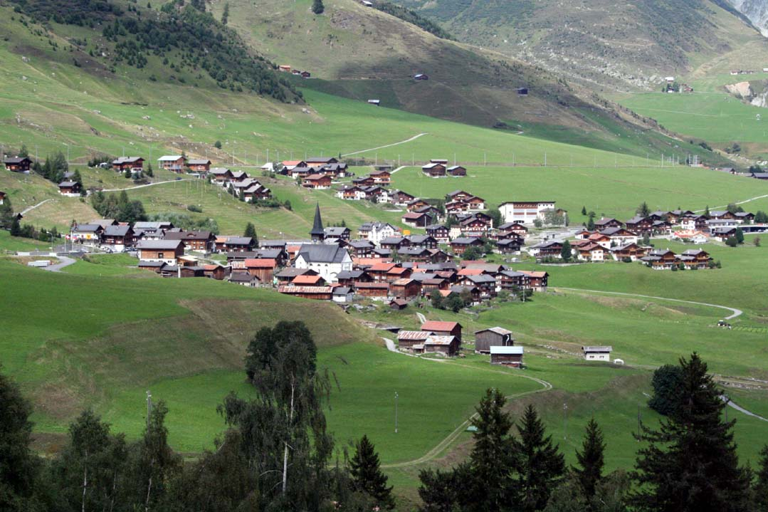 Sedrun-Rueras